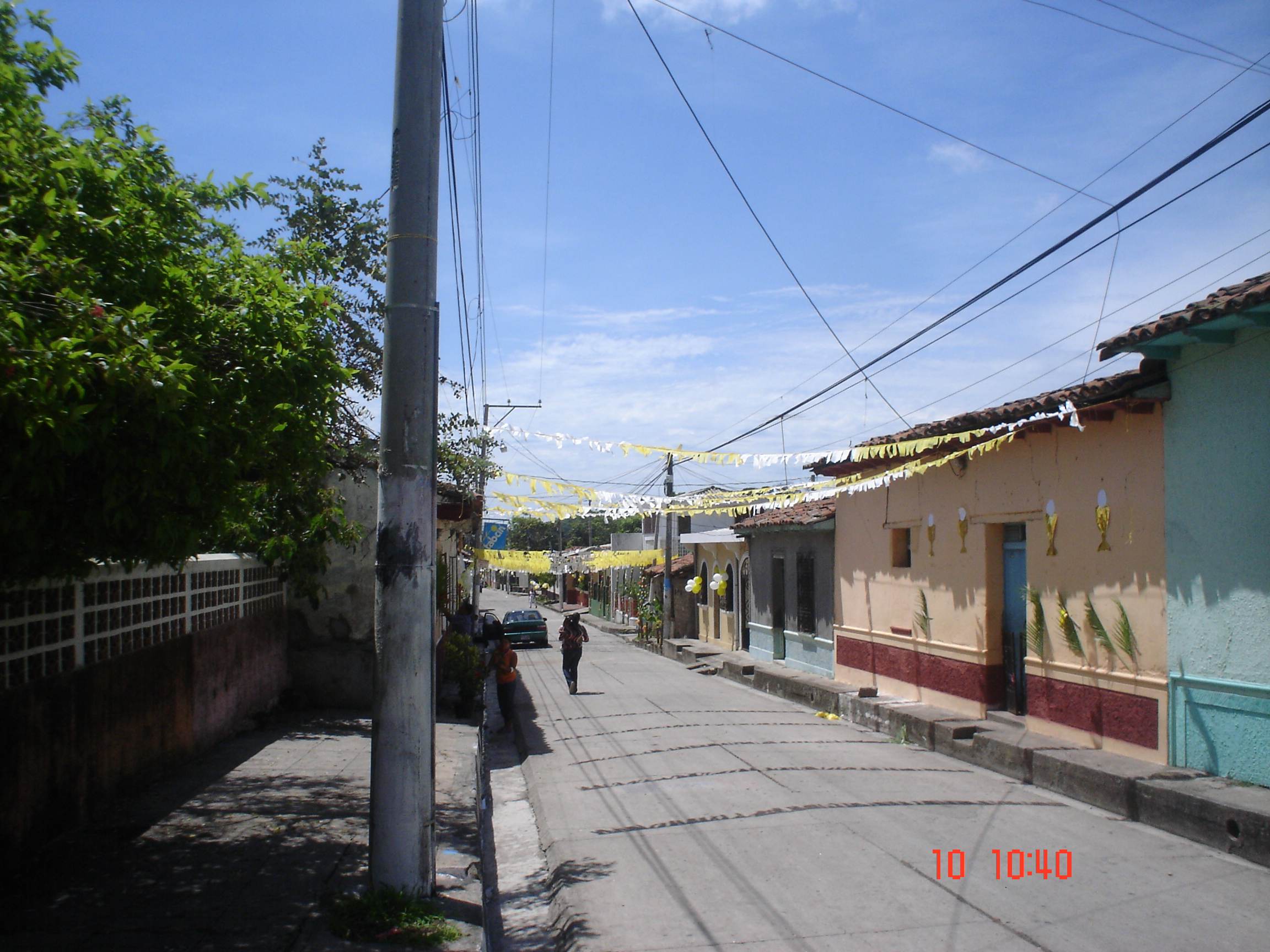 Calle Raymundo Lazo Dia de Corpus Christi